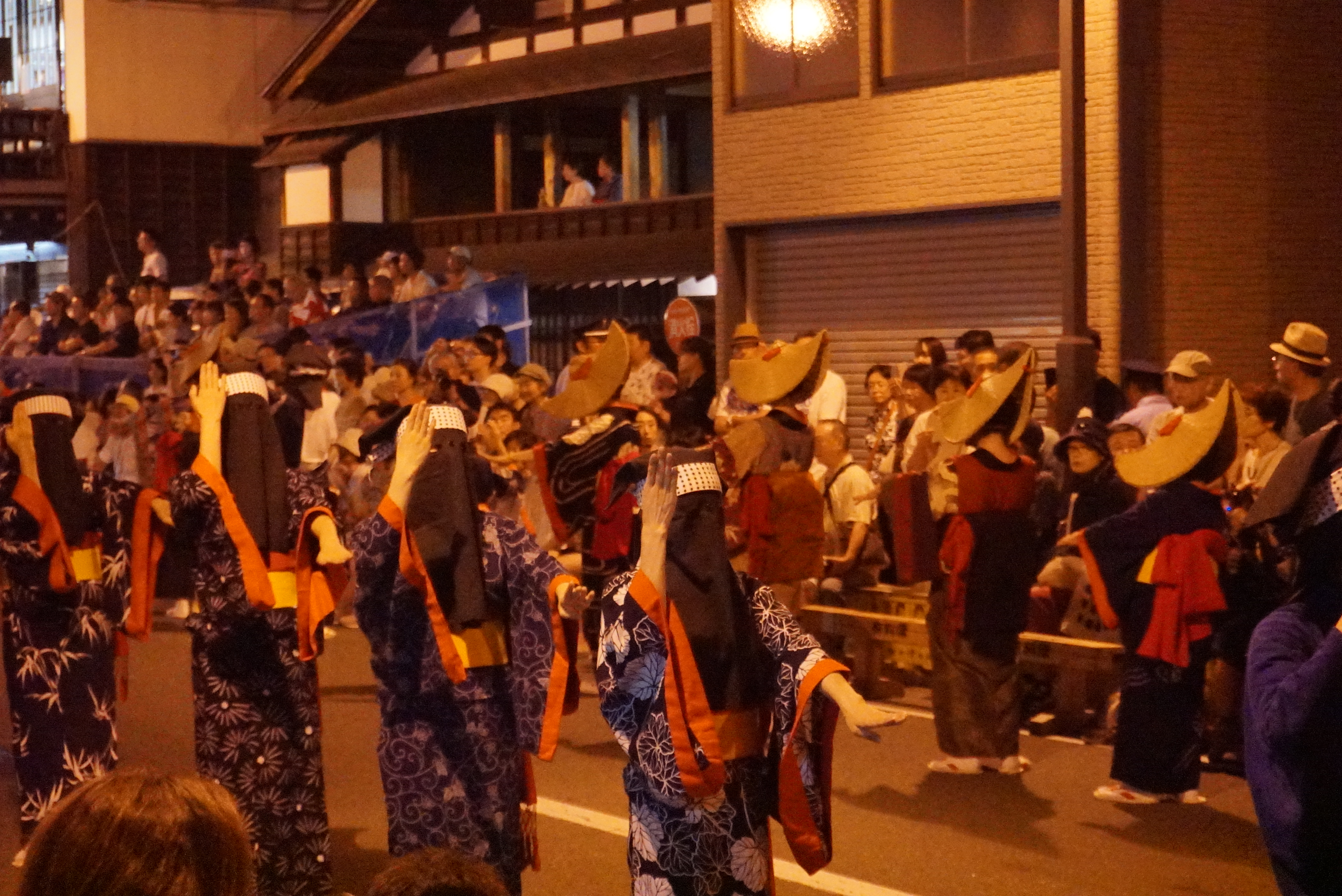 日本三大盆踊りの一つ、西馬音内の盆踊（秋田県羽後町）